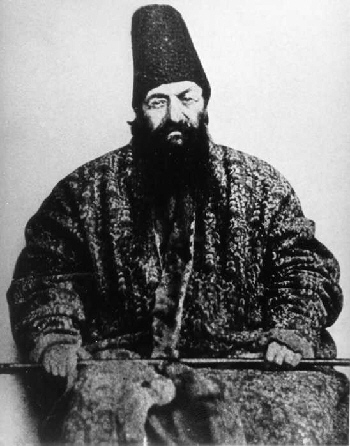 Reza Qoli Khan Hedayat